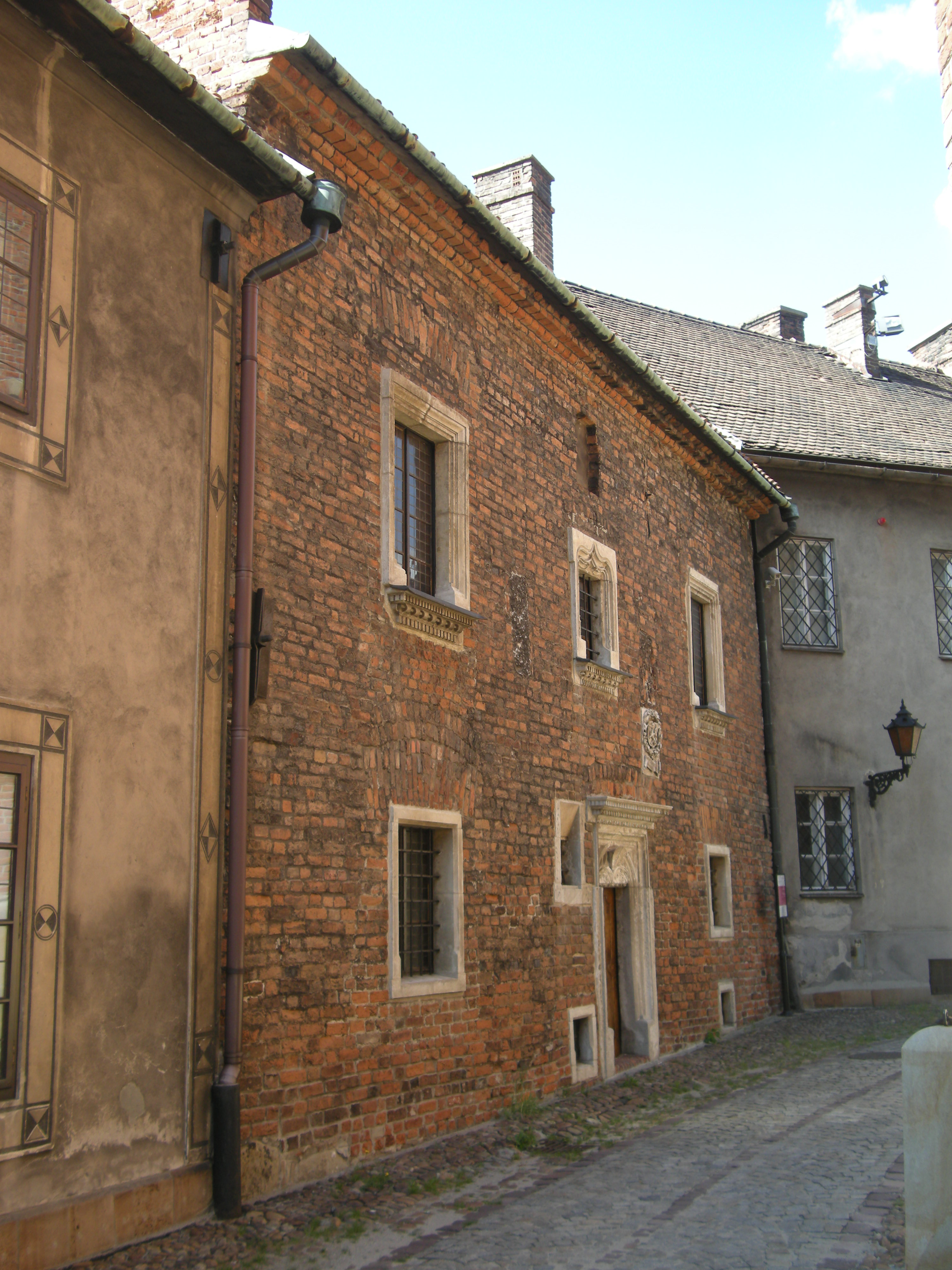 Dom Mikołajowski z 1524 r.